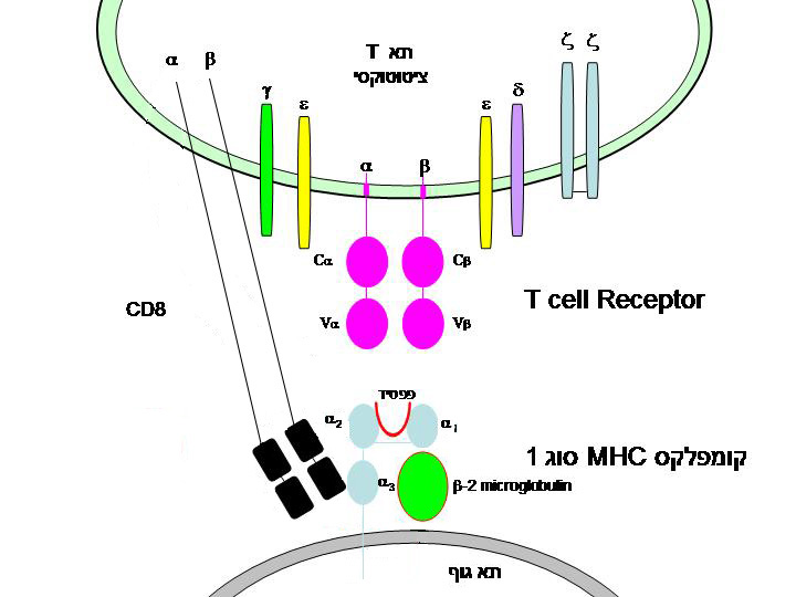 קומפלקס MHC מסוג I המוצג על תא נגוע בפתוגן וקישורו לקולטן של תא T ציטוטוקסי. קומפלקס MHC כולל שרשרת כבדה (באדם היא נקראת HLA), שרשרת קלה (בטא-מיקרוגלובולין) ופפטיד שמקורו בפתוגן או בהתמרה סרטנית. תאי T מציגים את קולטן תאי ה-T הכולל את שרשראות אלפא ובטא הנקשרות לקומפלקס MHC ואת שרשראות גמא, דלתא, אפסילון וזטא המעבירות אותות לפנים התא. הקומפלקס כולו נקרא TCR/CD3. תאי T ציטוטוקסיים נושאים גם את החלבון CD8 הנקשר לקומפלקס ה-MHC באזור אחר.